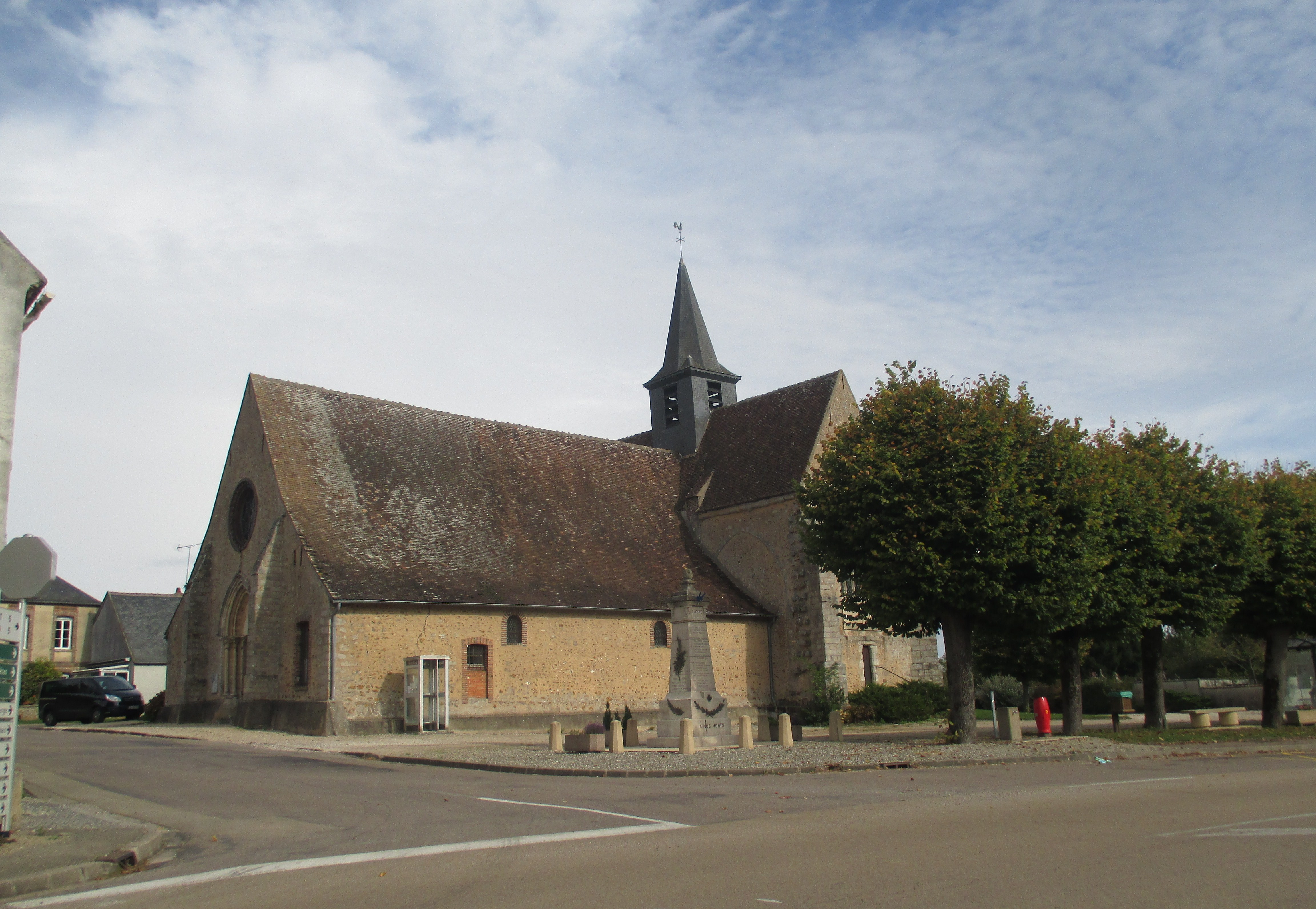 Place de l'église à Bussy-le-Repos (Yonne) avec l'église Saint-Pierre et le monument aux morts.